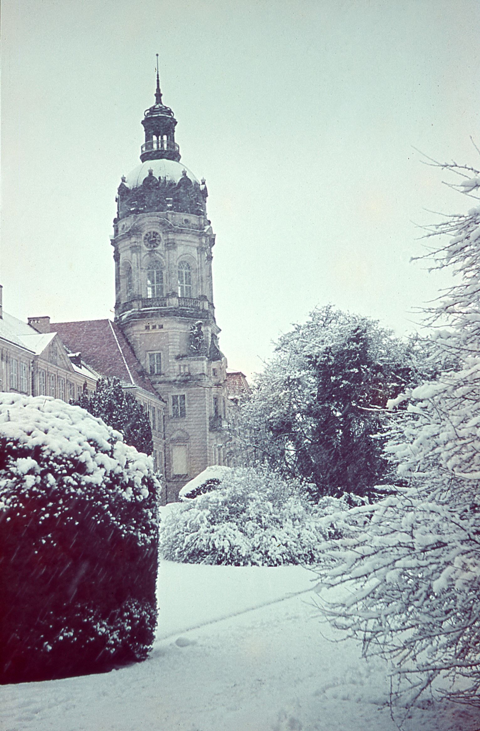 Schloss Neustrelitz Schlossturm Winter Farbfoto um 1940